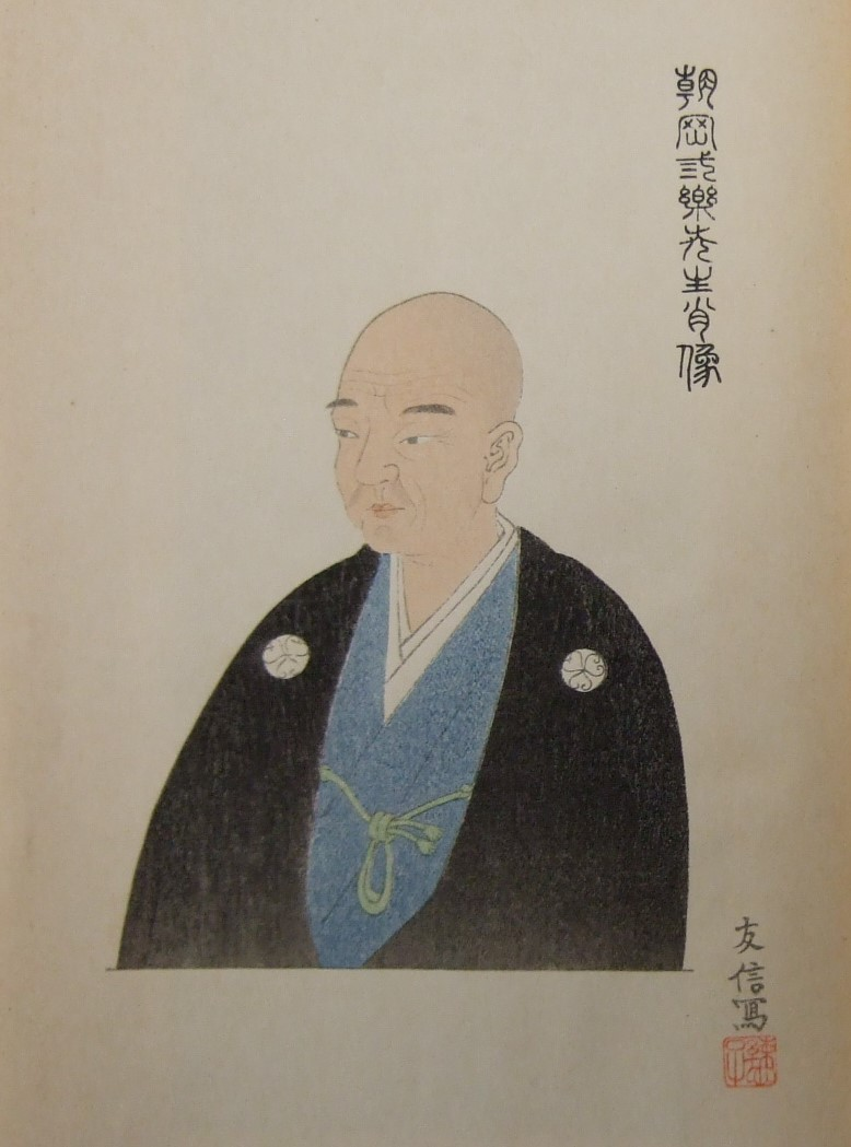 朝岡弎楽先生肖像